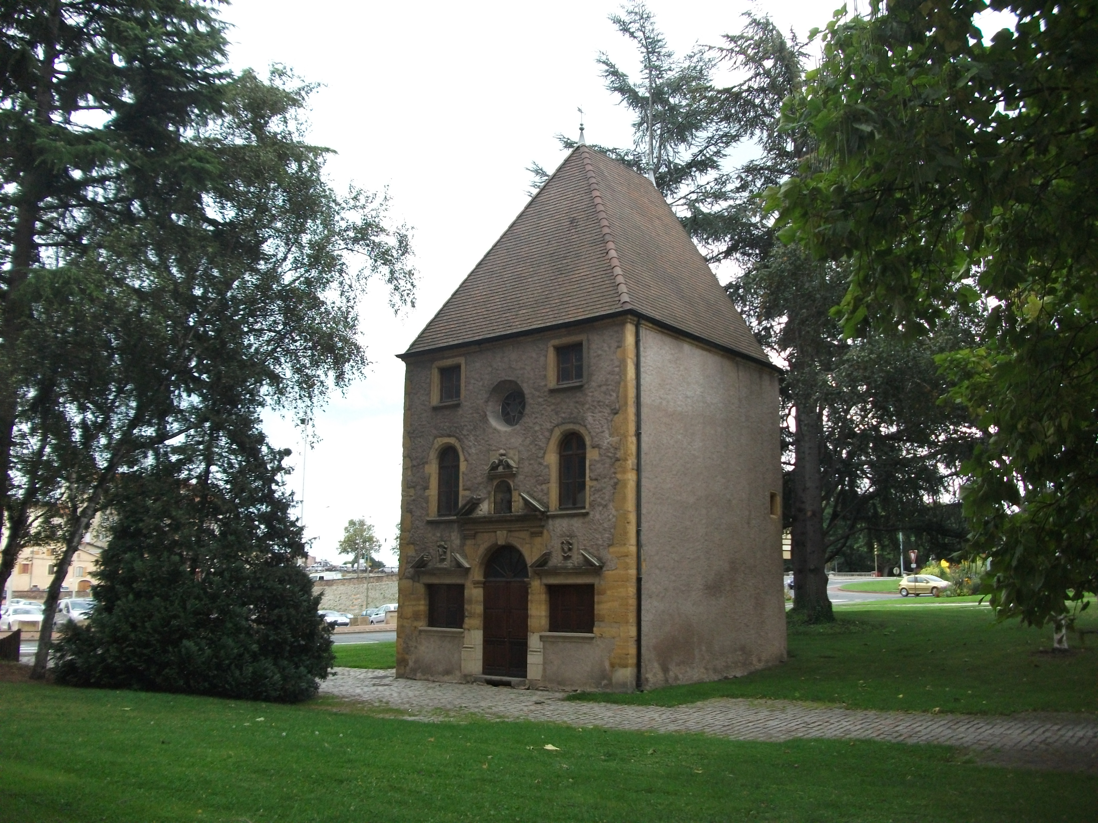 Chapelle Saint-Nicolas-du-Port de Roanne, 3 rue des Minimes (Inscrit, 1964) .